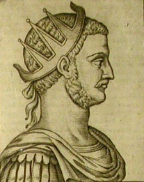 Retrato del emperador romano Floriano